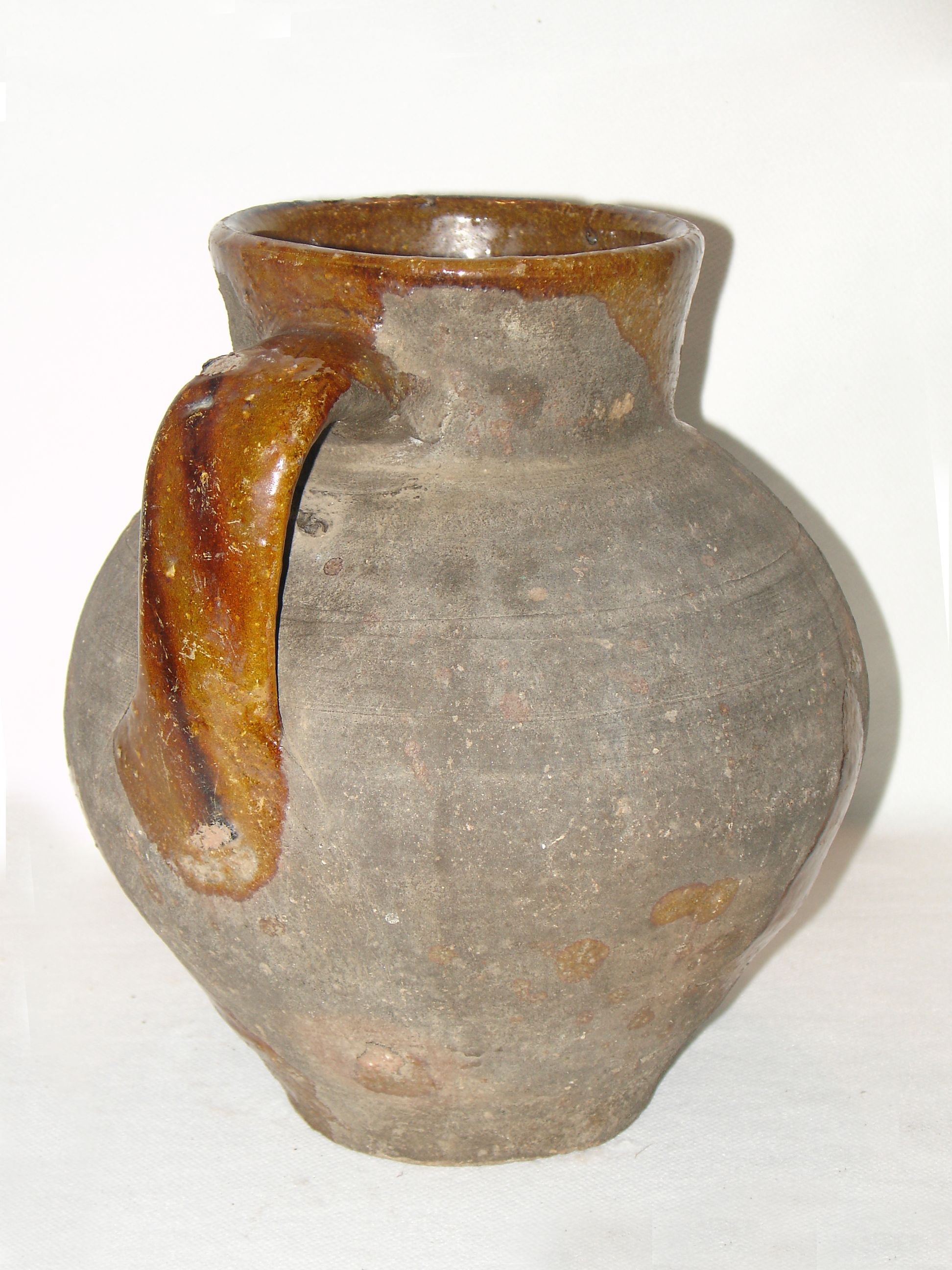 Puchero de Alcorcón. Siglo XIX principios XX. Alfarería de Pascual Pérez